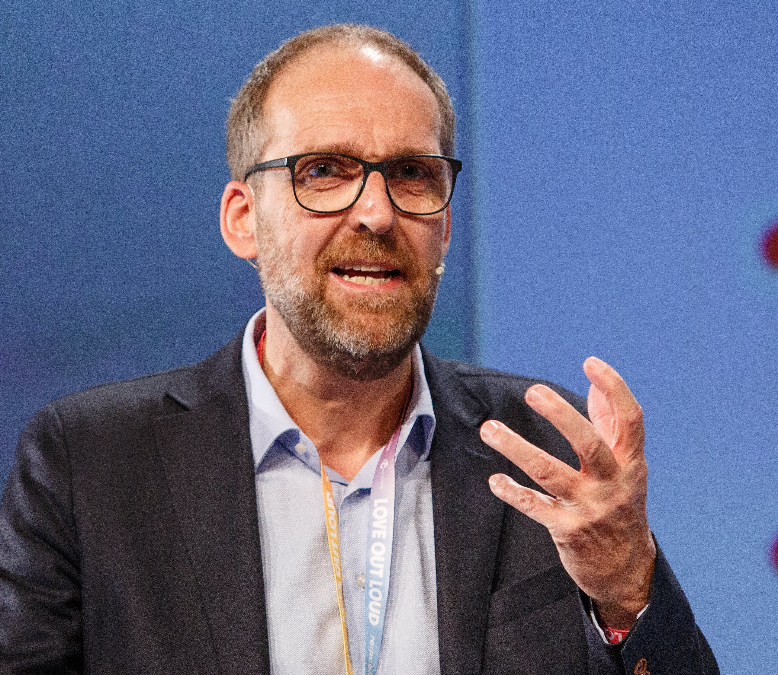 Christoph Kucklick am 09.05.2017 mit seinem Talk "Die digitale Konterrevolution: Wie Europa seine Bürger entmündigt" auf der re:publica (#rp17) in Berlin. Foto: re:publica/Jan Zappner